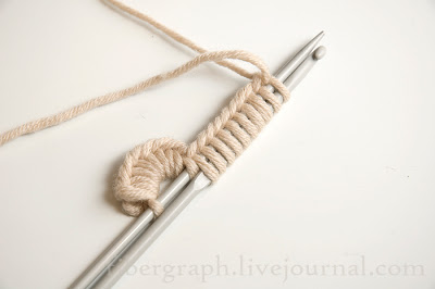 tığ işi